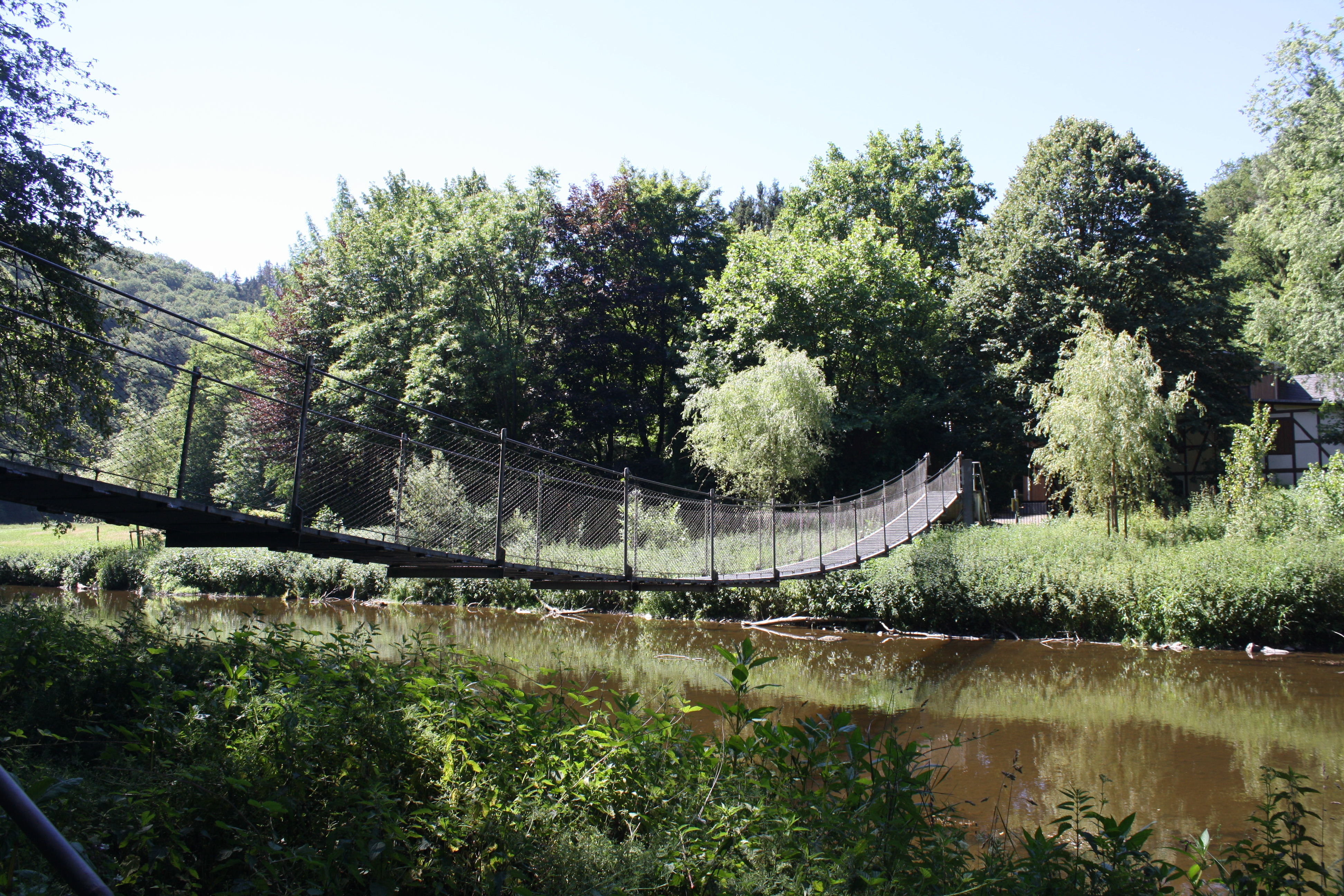 Die 2010 wieder errichtete Seilhängebrücke von Flögert bei Helmeroth im Landkreis Altenkirchen/Ww.